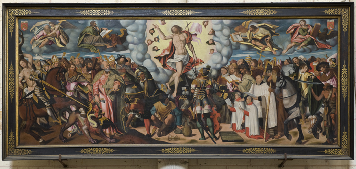 Poitiers (Vienne, France), cathédrale St Pierre, la Résurrection par Nicolas Pinson en 1598.